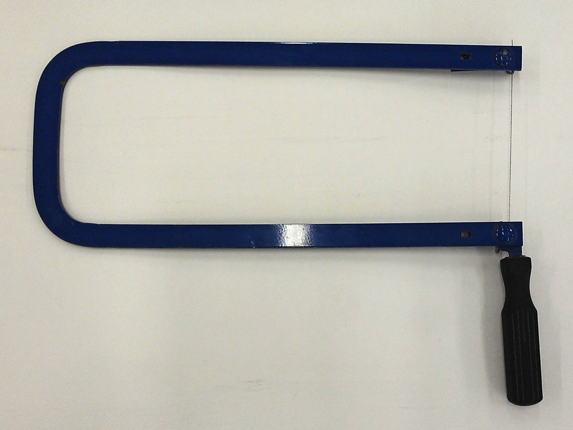 Lupin sah es